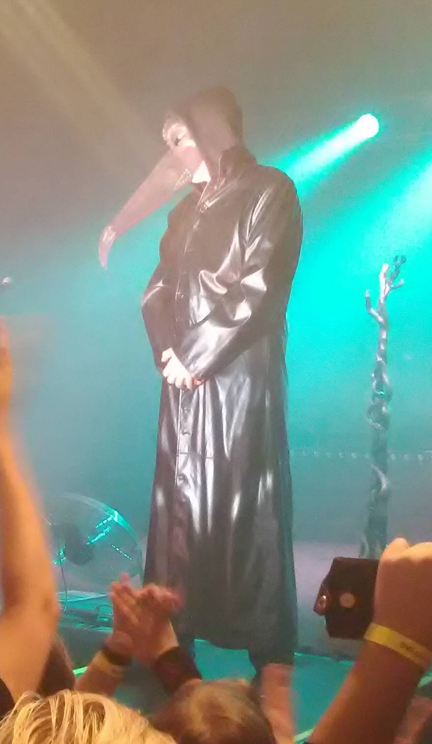 Postava krkavce na závěr písně Sedmero krkavců od kapely Dymytry (Svijany Tour 2017, Zábřeh)